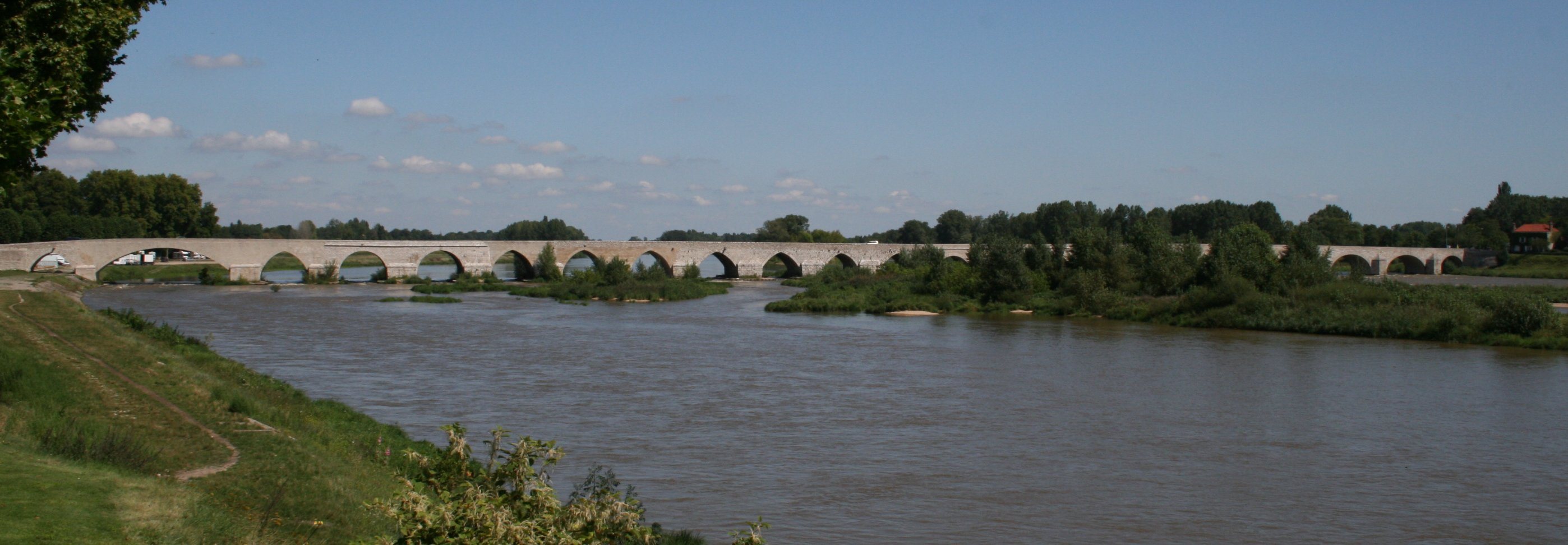 Pont de Beaugency (Loiret - France) – vue panoramique